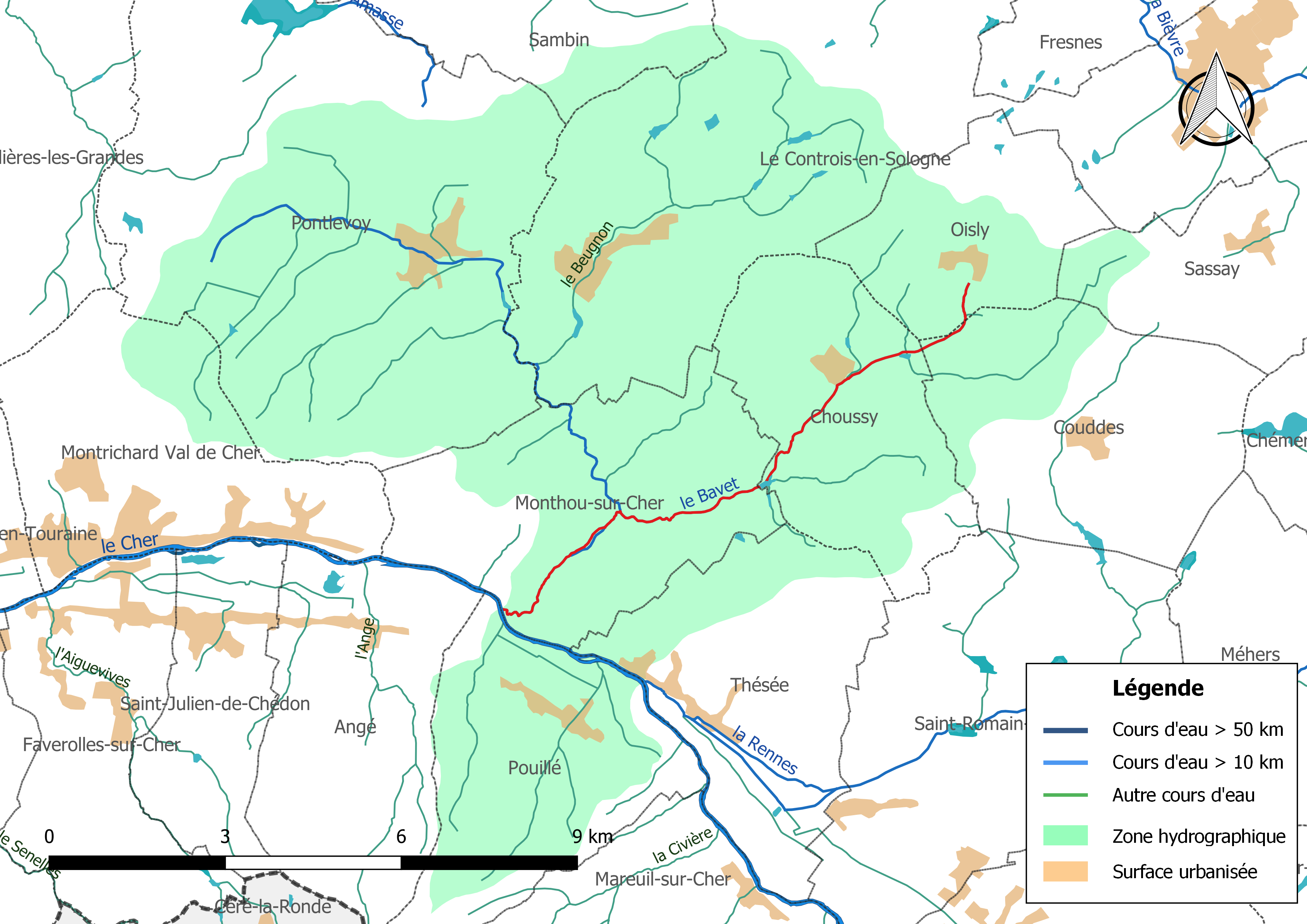 Carte du cours d'eau « le Bavet » et de son bassin versant (zone hydrographique dans laquelle il s'insère).